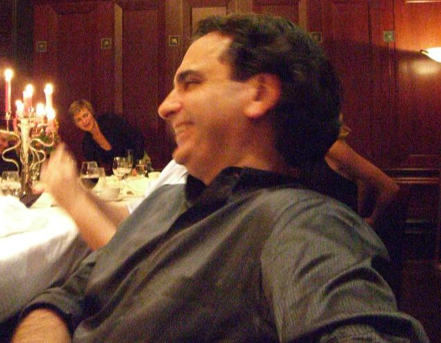 Daniel Langlois, Canadian businessman. Daniel Langlois, né à Jonquière en 1957, est un homme d'affaires et mécène québécois du domaine du multimédia et de l'informatique.